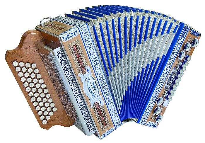 Michlbauer Novak Superium Kirsch blau, 46 Melodietasten, 16 Bässe, X-Bass und H-Bass